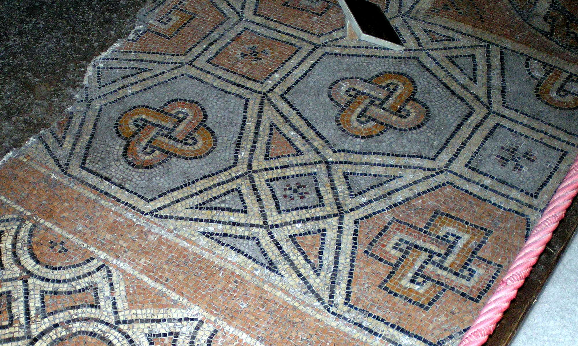 Torre campanile della Basilica dei santi Felice e Fortunato (Vicenza) OLYMPUS DIGITAL CAMERA